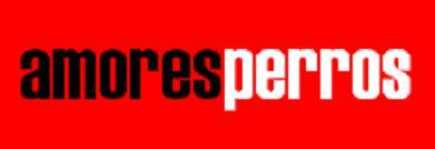 Tres personajes se encuentran en una misma escena de accidente, durante 3 historias.